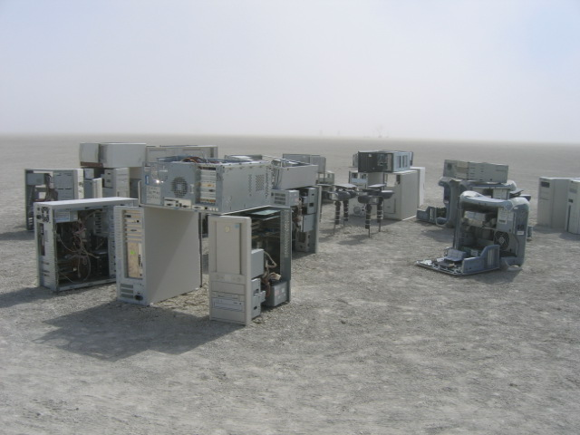 Стоунхендж пресъздаден с компютри на Burning Man (2006 г.).